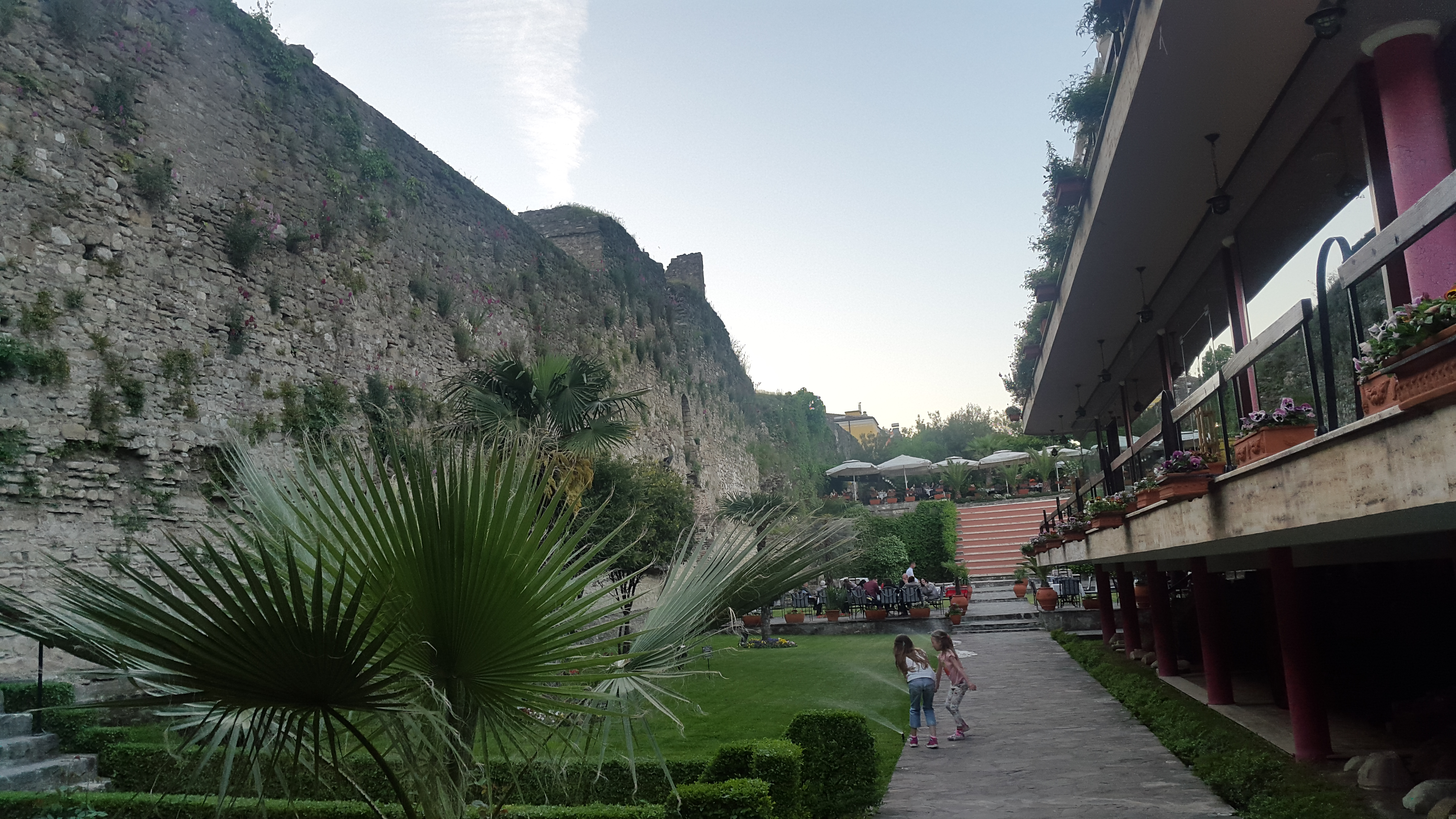 Pamje në Elbasan.